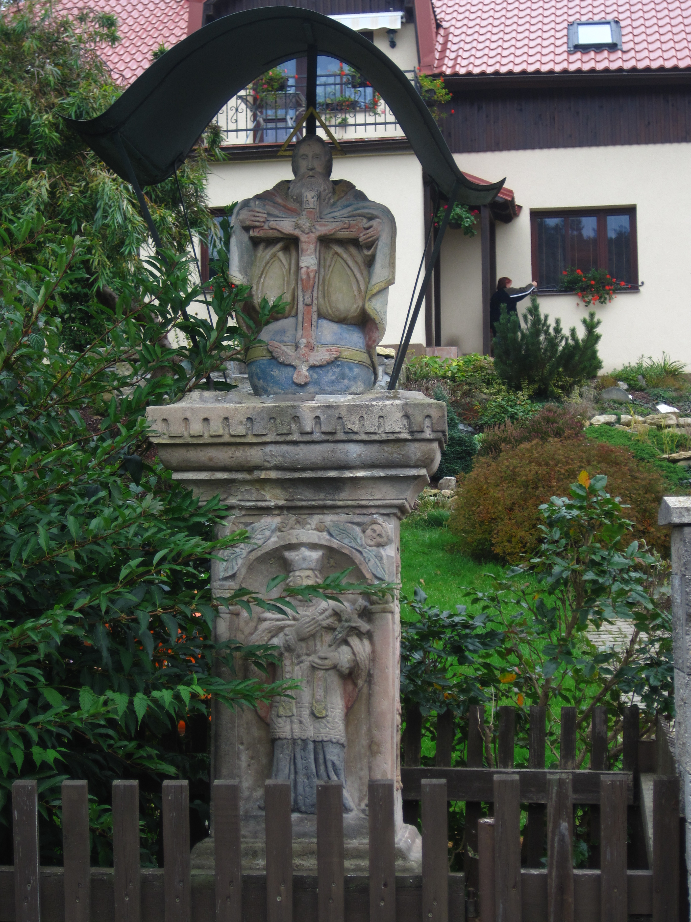 Sousoší Nejsvětější Trojice, při čp. 34, Všelibice.